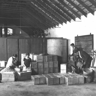 sin descripción